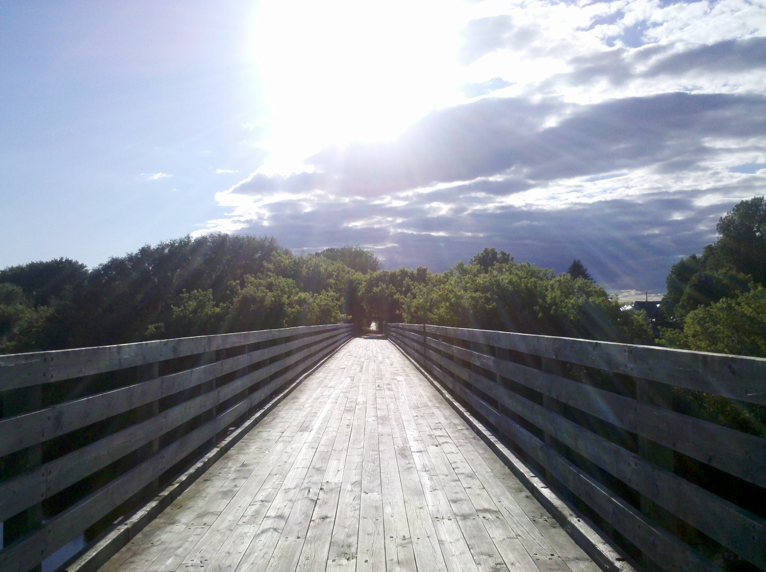 Pont traversant la rivière Yamaska à Saint-Césaire (Québec) sur La route des Champs